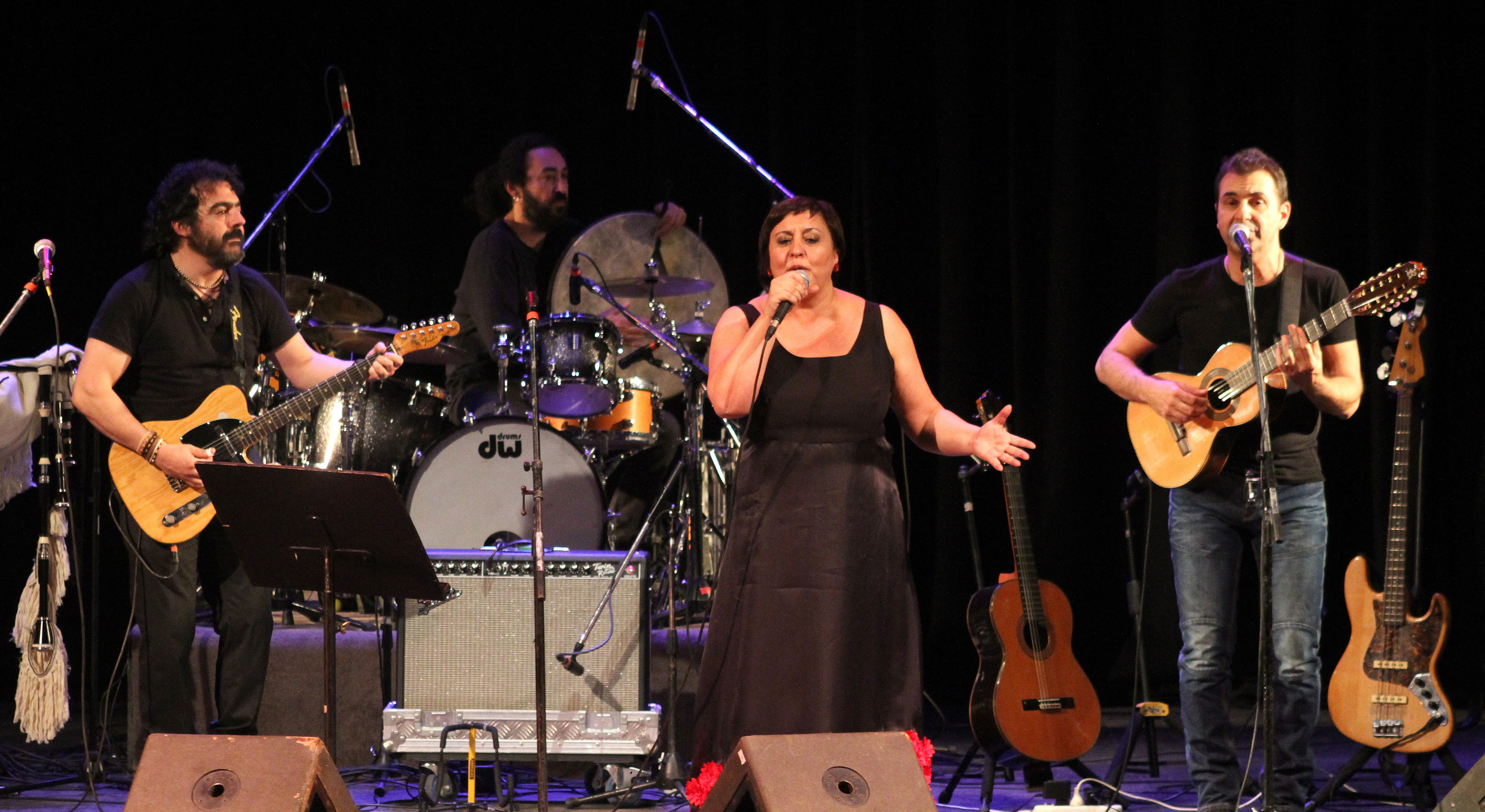 Mar del Plata, 17 de Mayo de 2014. En el marco del MICSUR, se llevó a cabo el espectáculo que pretende mostrar la creatividad musical de Galicia, a través de un elenco de reconocidos artistas gallegos, con un repertorio desde lo tradicional hasta lo contemporáneo.Los artistas del espectáculo son UXIA, Rosa Cedrón, Budiño y Narf.